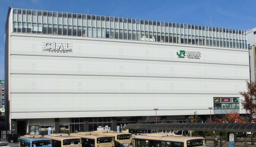 CIAL Tsurumi (Yokohama, Kanagawa Prefecture, Japan)